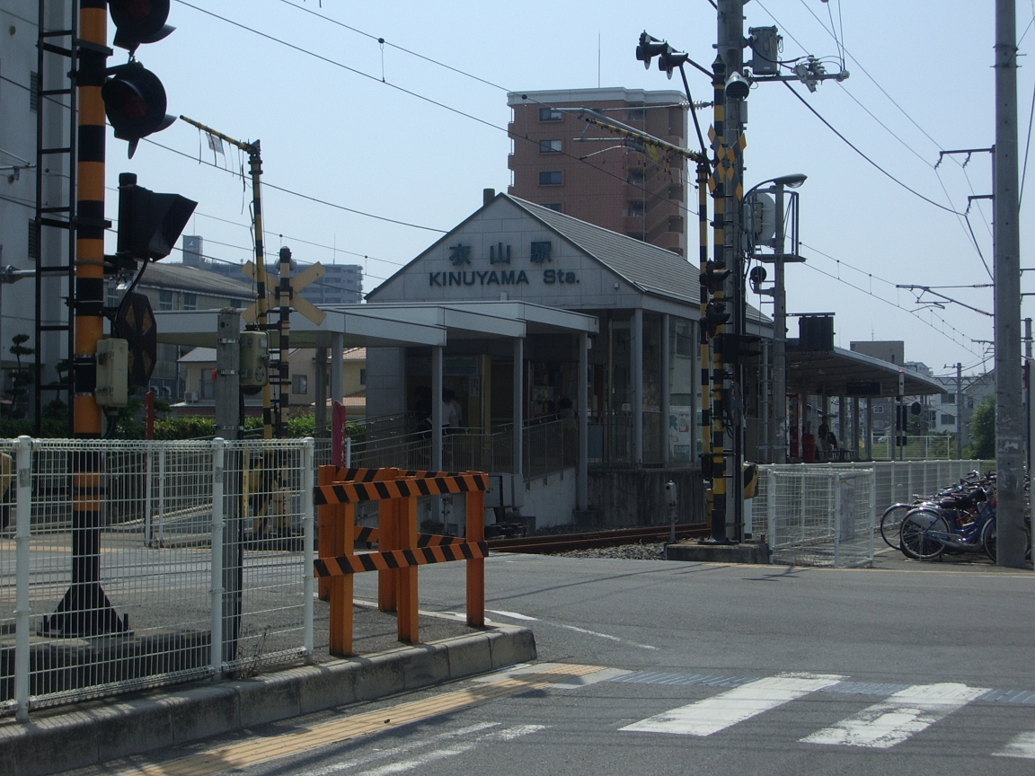 Kinuyama Station Bldg. (Iyo Railway)